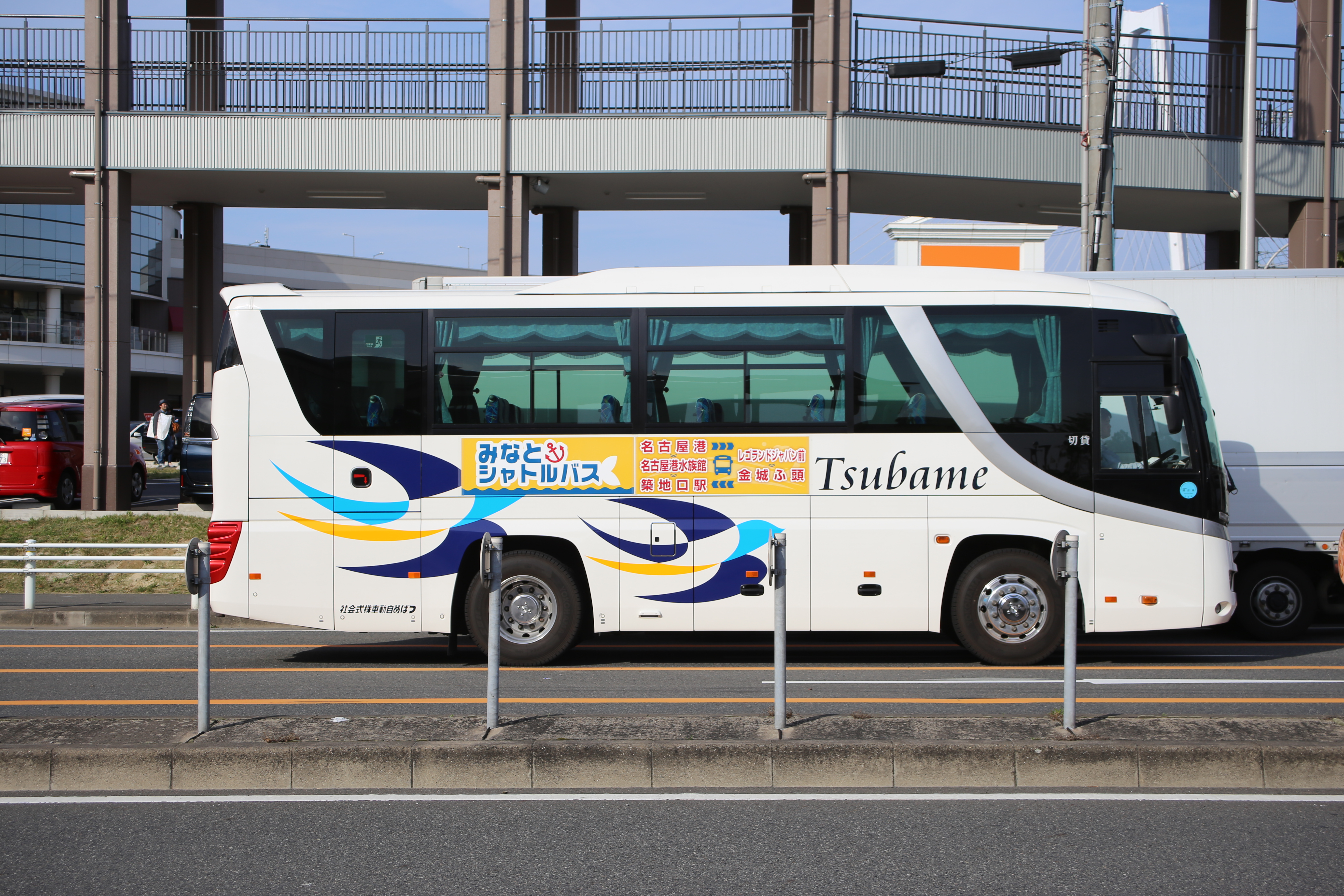 つばめ自動車が運行する みなとシャトルの車両